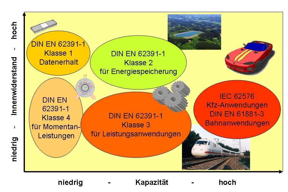 Klasseneinteilung von Doppelschichtkondensatoren nach DIN EN 62391-1